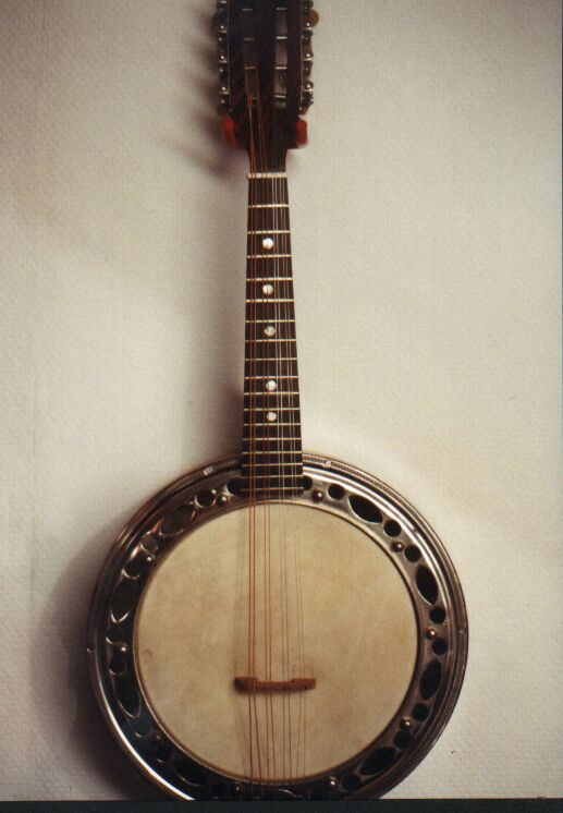 Mandolinenbanjo, Alter und Herkunft unbekannt